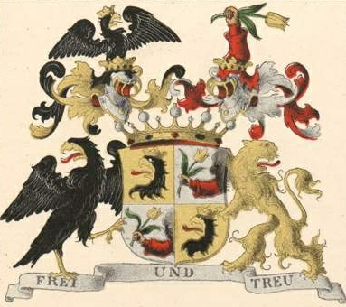 Simolini suguvõsa vabahärravapp